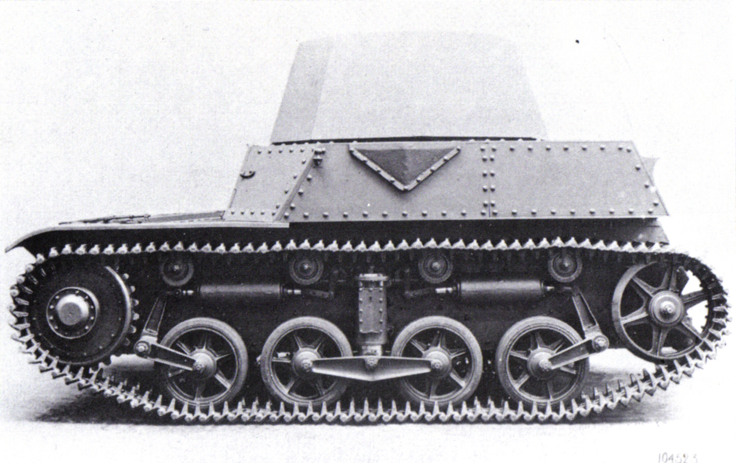 Digitale reproductie foto van het prototype van de AMC 34 tank